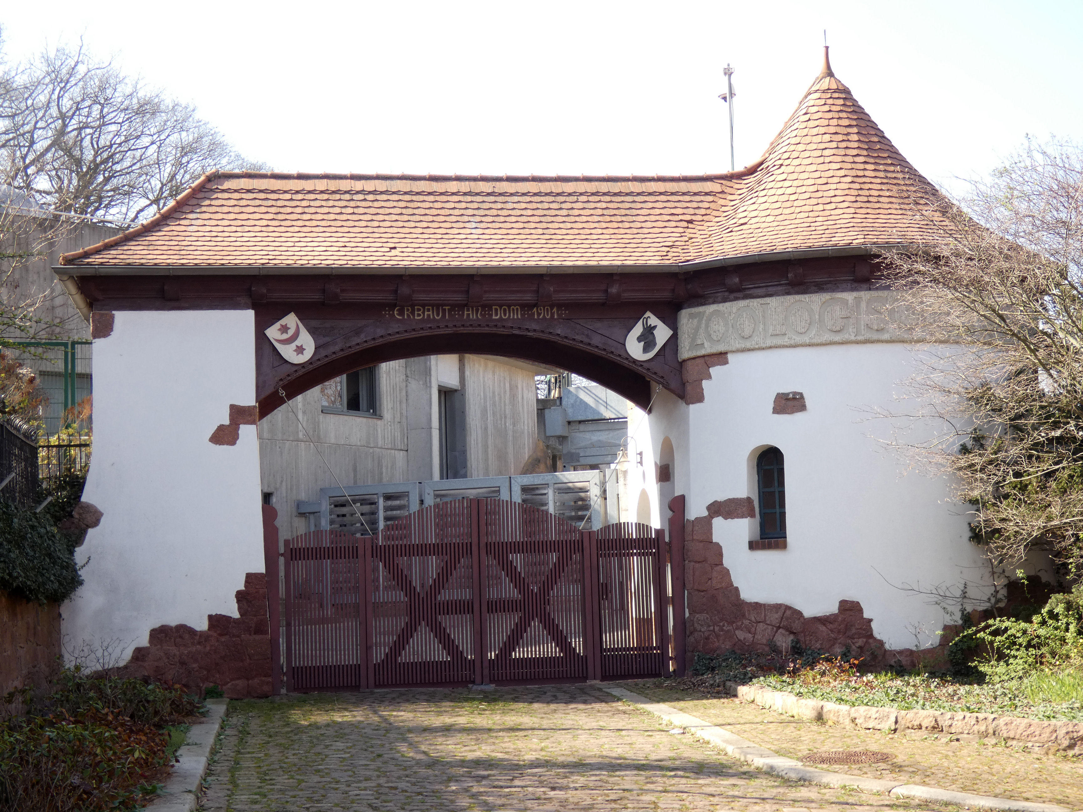 Ehemaliger Haupteingang des Zoo Halle (Saale), erbaut 1901, Tiergartenstraße